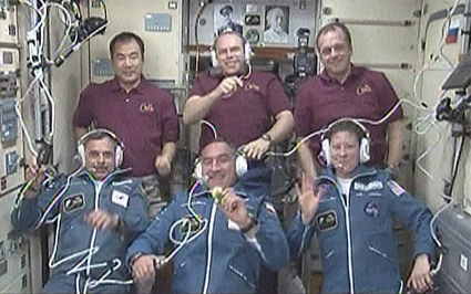 L'équipage de Soyouz TMA-18 arrive à bord de l'ISS.